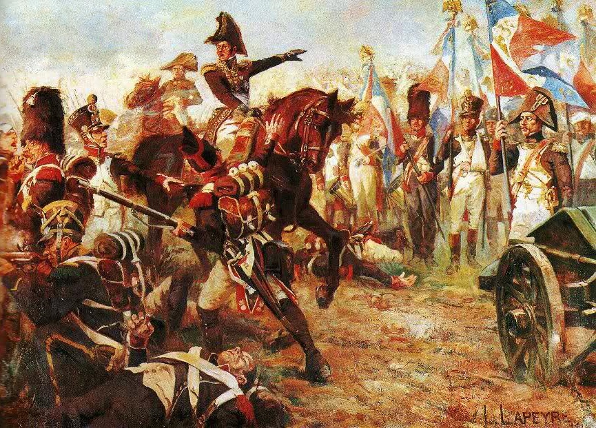 Le général Jean-Baptiste Broussier fait promettre à sa troupe de « périr pour les aigles » à la bataille de Wagram, le 6 juillet 1809. La division Broussier y fait partie de la colonne du général Macdonald, chargé de bousculer le centre autrichien.